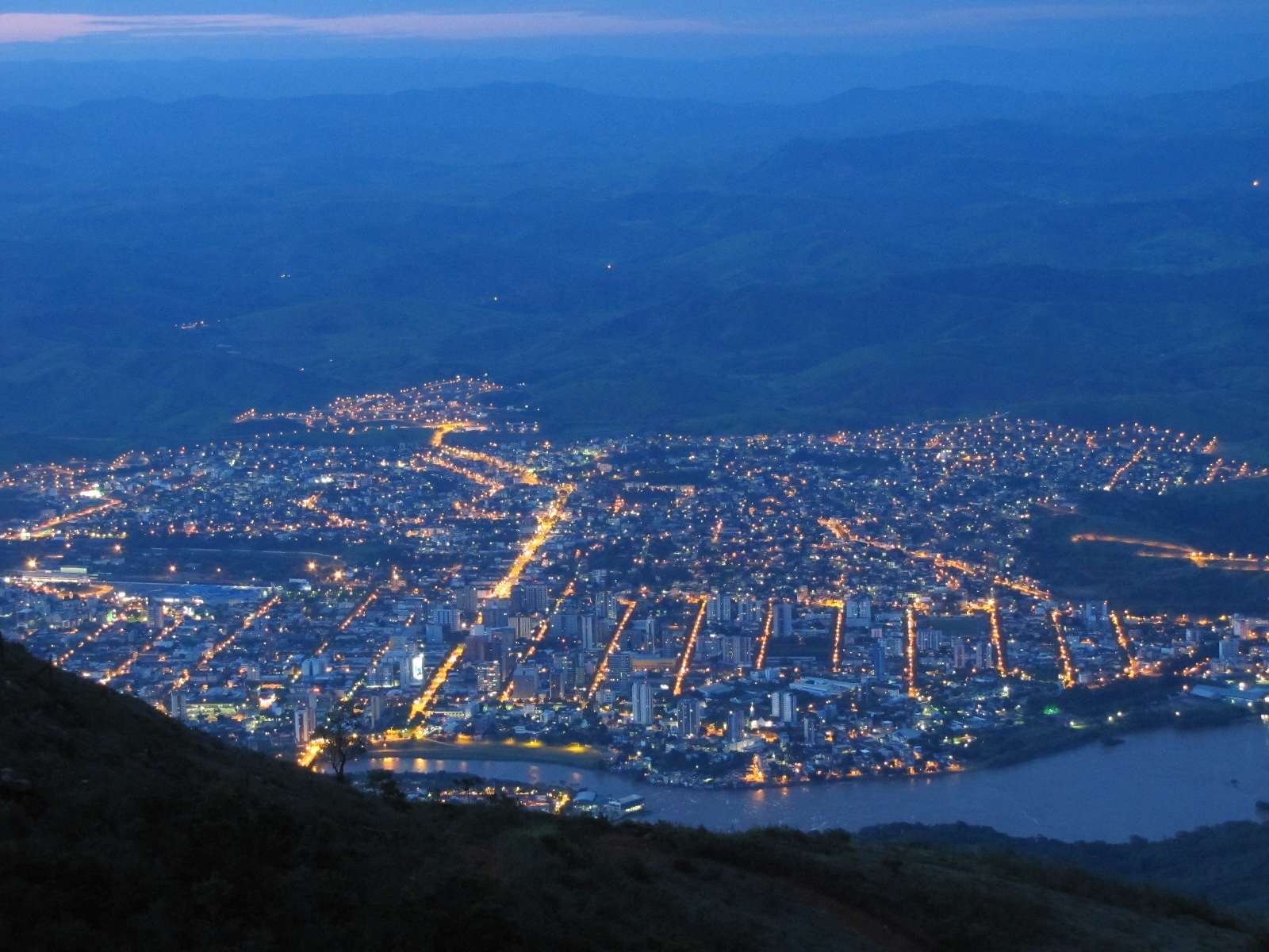 Ibituruna vista da cidade